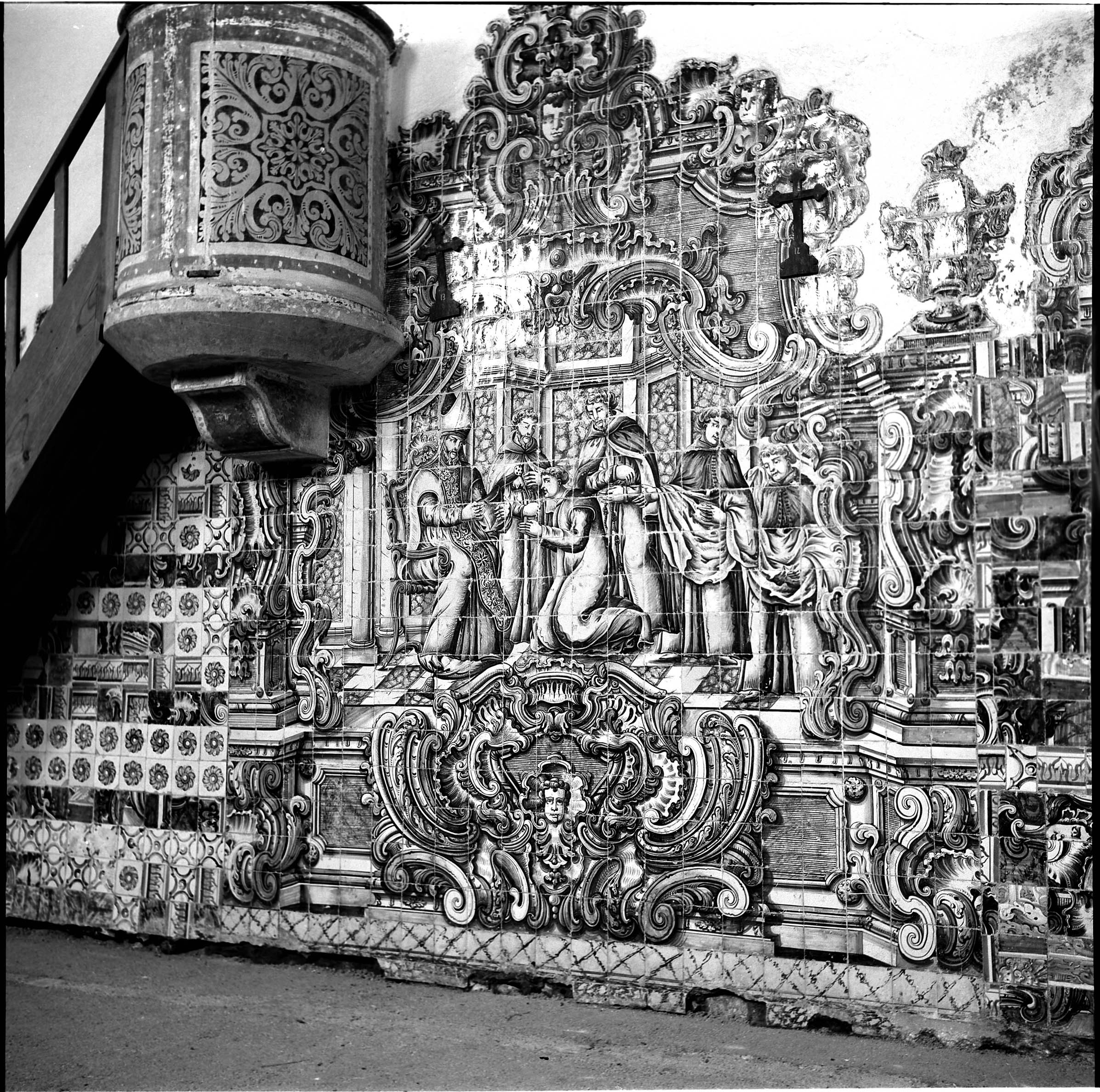 Baptismo. Azulejos do século 18. Fotógrafo: João Miguel dos Santos Simões, 1907-1972. Data de produção da fotografia original: 1960-1970. [CFT009.0353n.ic]